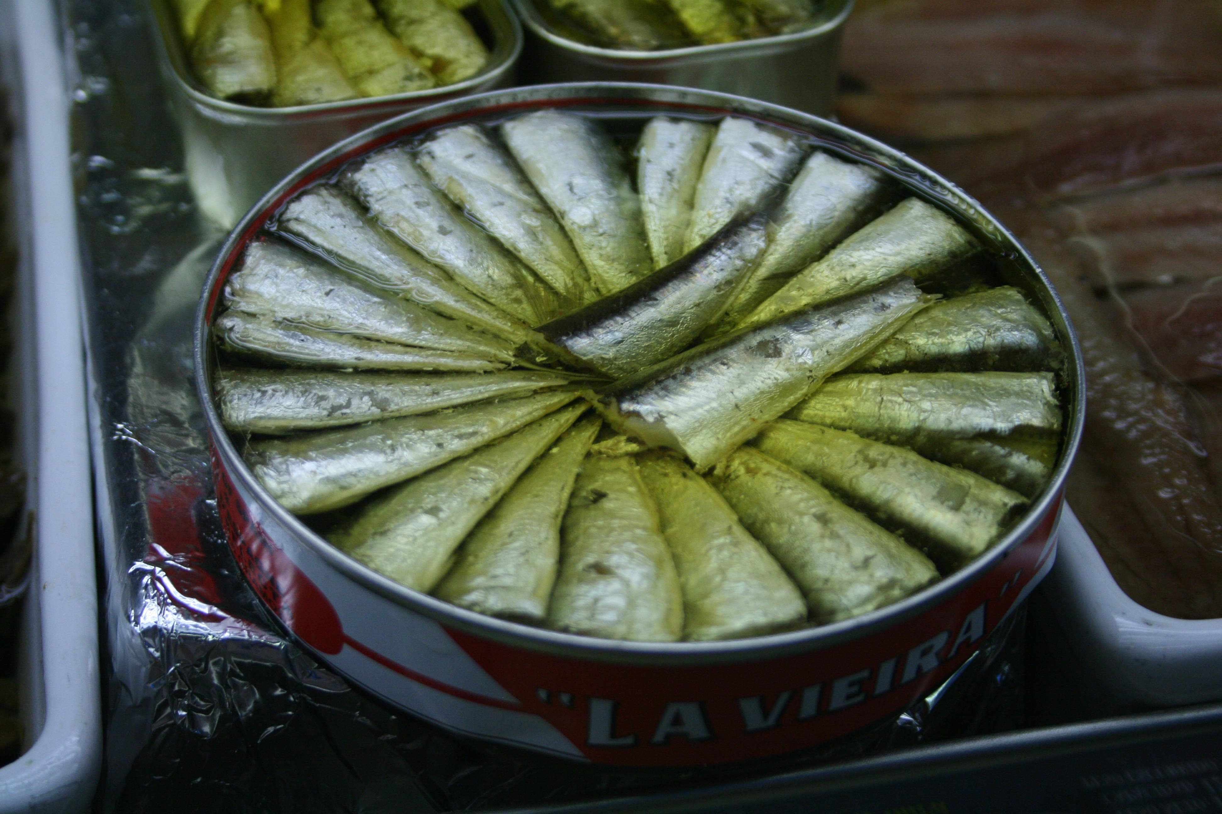 Sardinas enlatadas